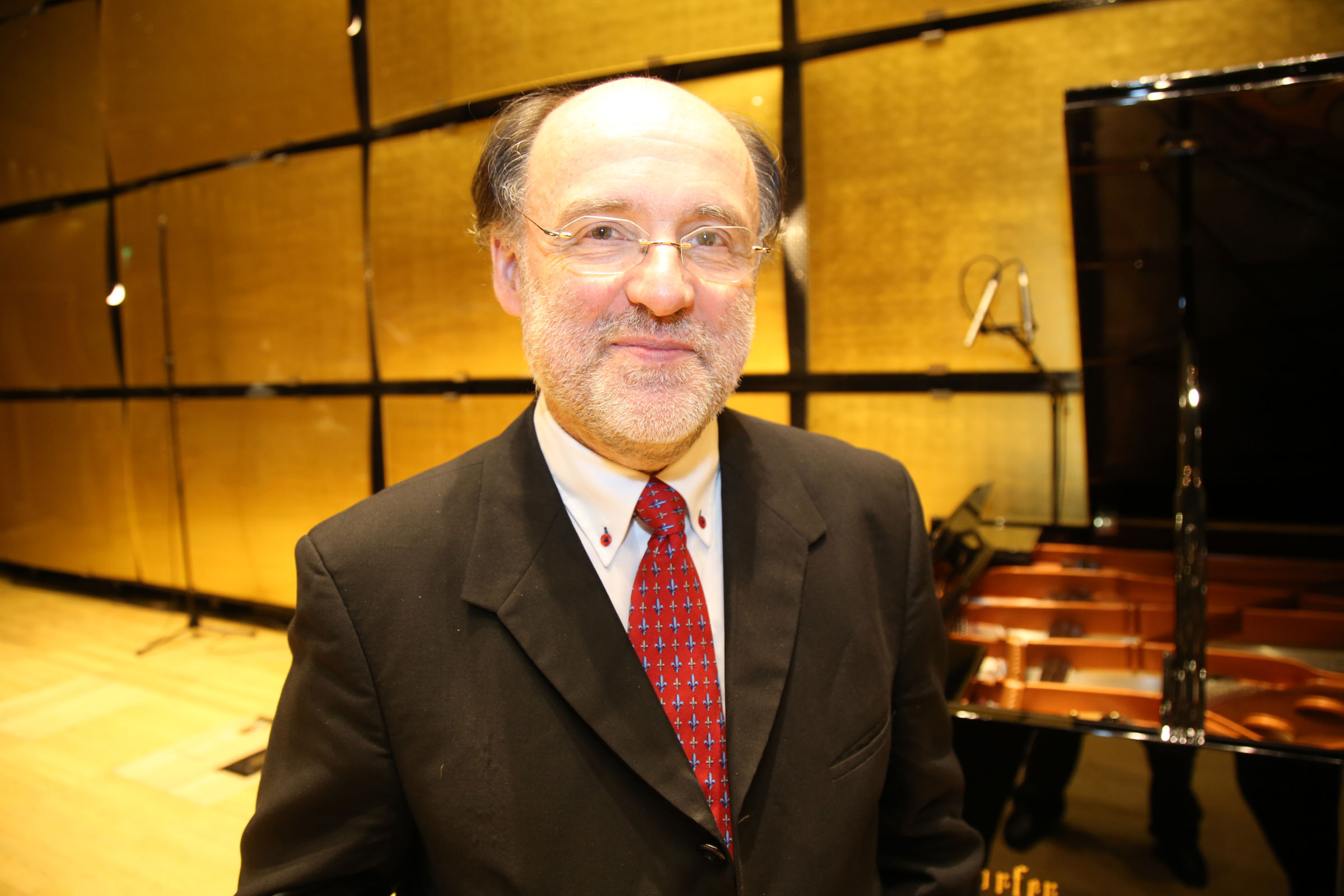 Walter Kobera,Intendant Neue Oper Wien